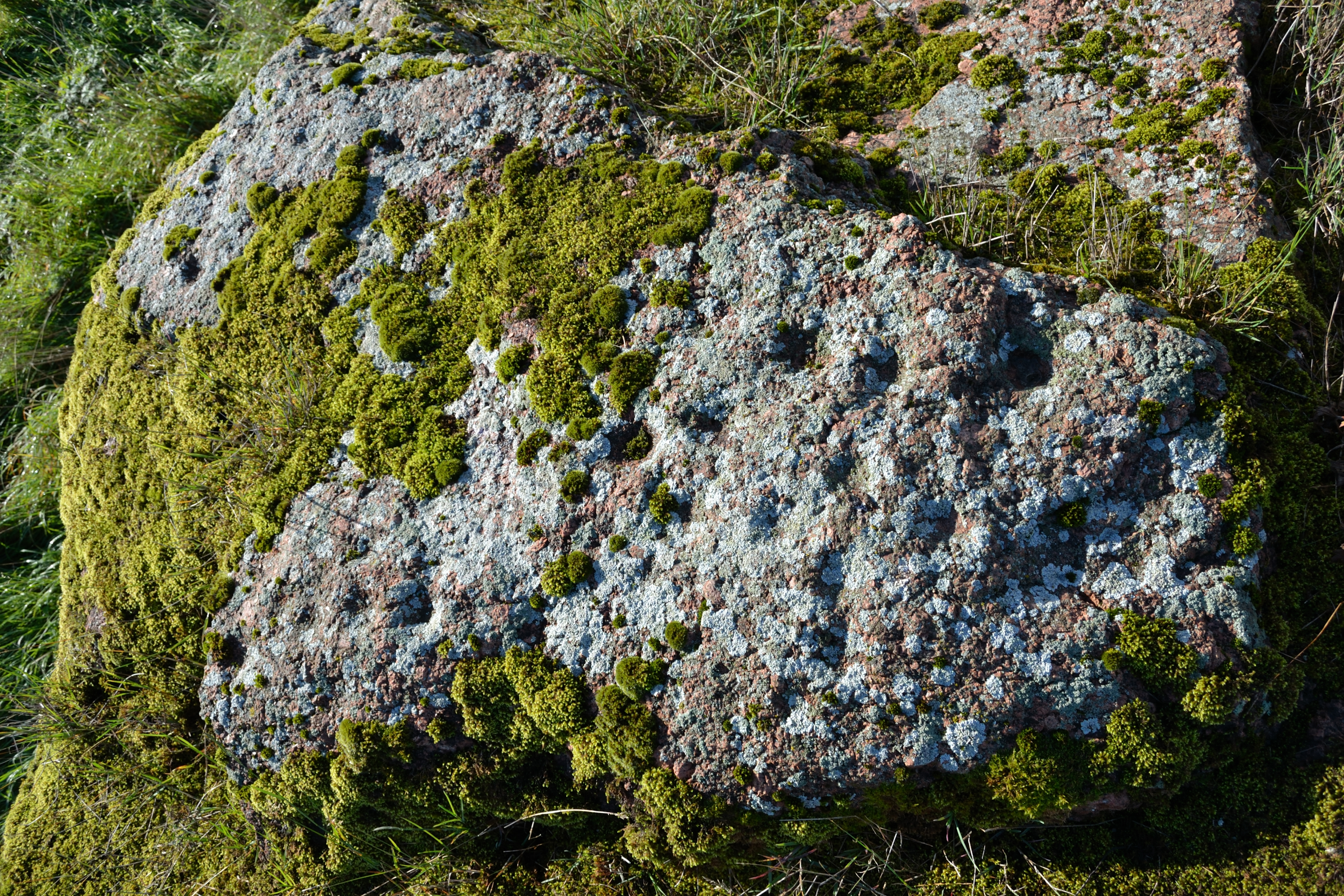 Kultusekivi, Saue vald, Kiia küla